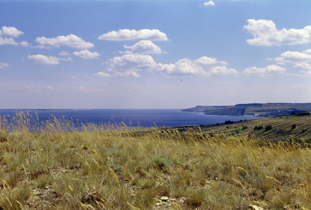 Банновское заказник, Красноармейский район This image is related to the protected area of Russia number 6410078